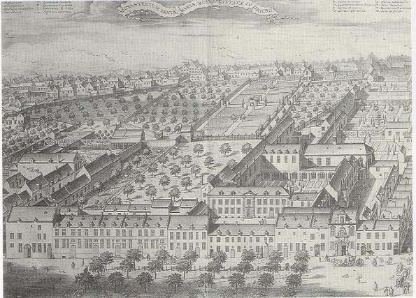 Het Klooster van Jericho aan de graanmarkt te Brussel in de 17 de eeuw.